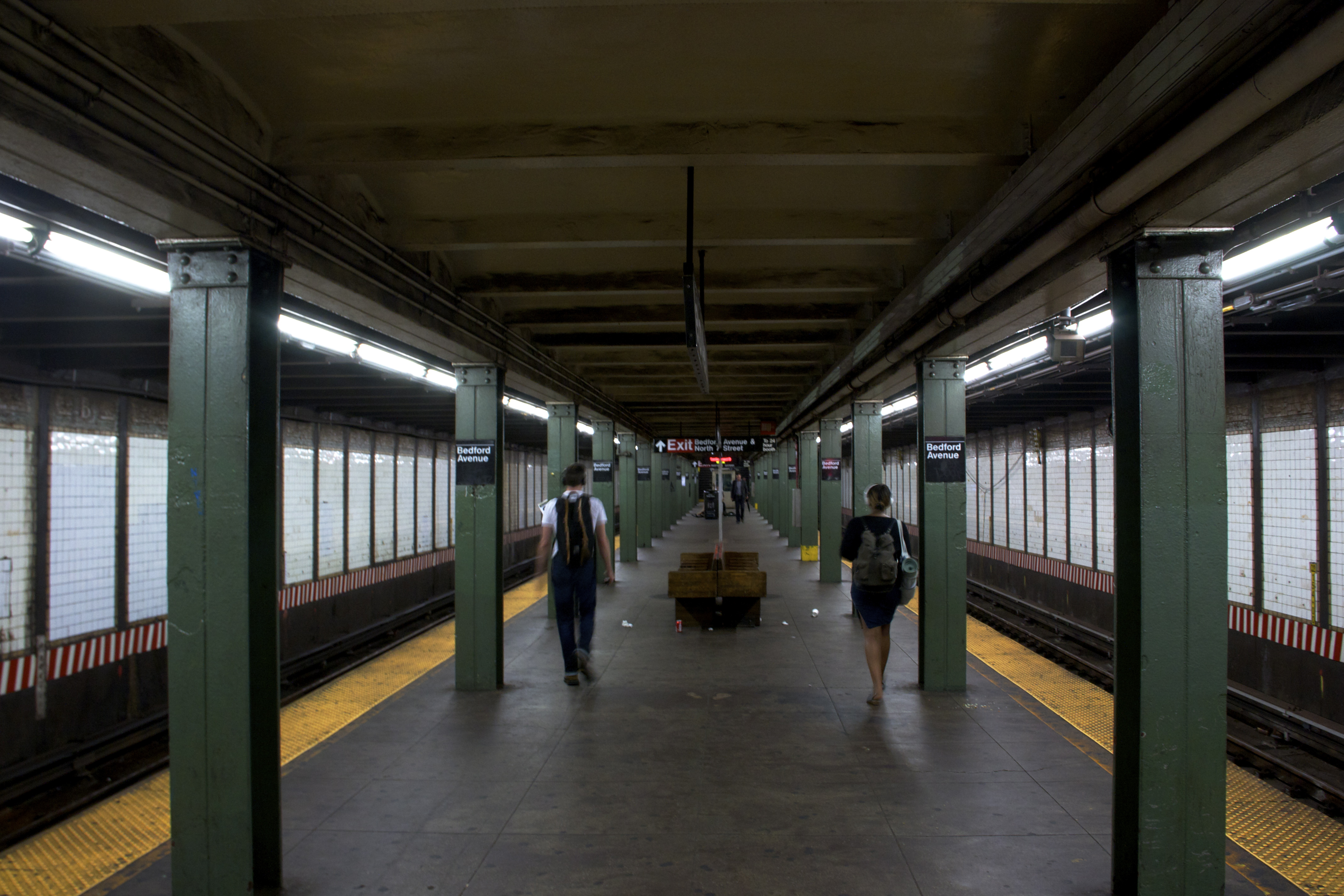 Taken 13 August 2013